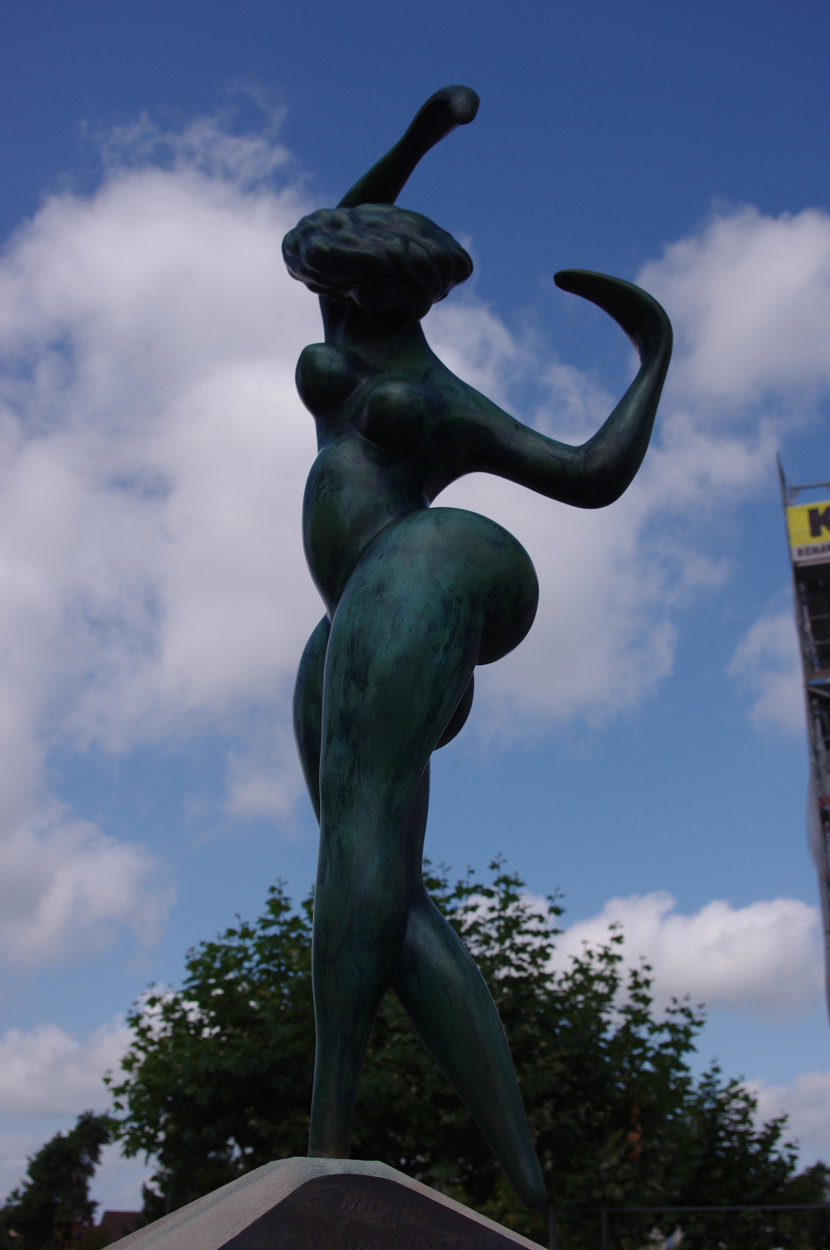 statue moderne (XXème siècle), bronze, illzach représentant la muse Thalie